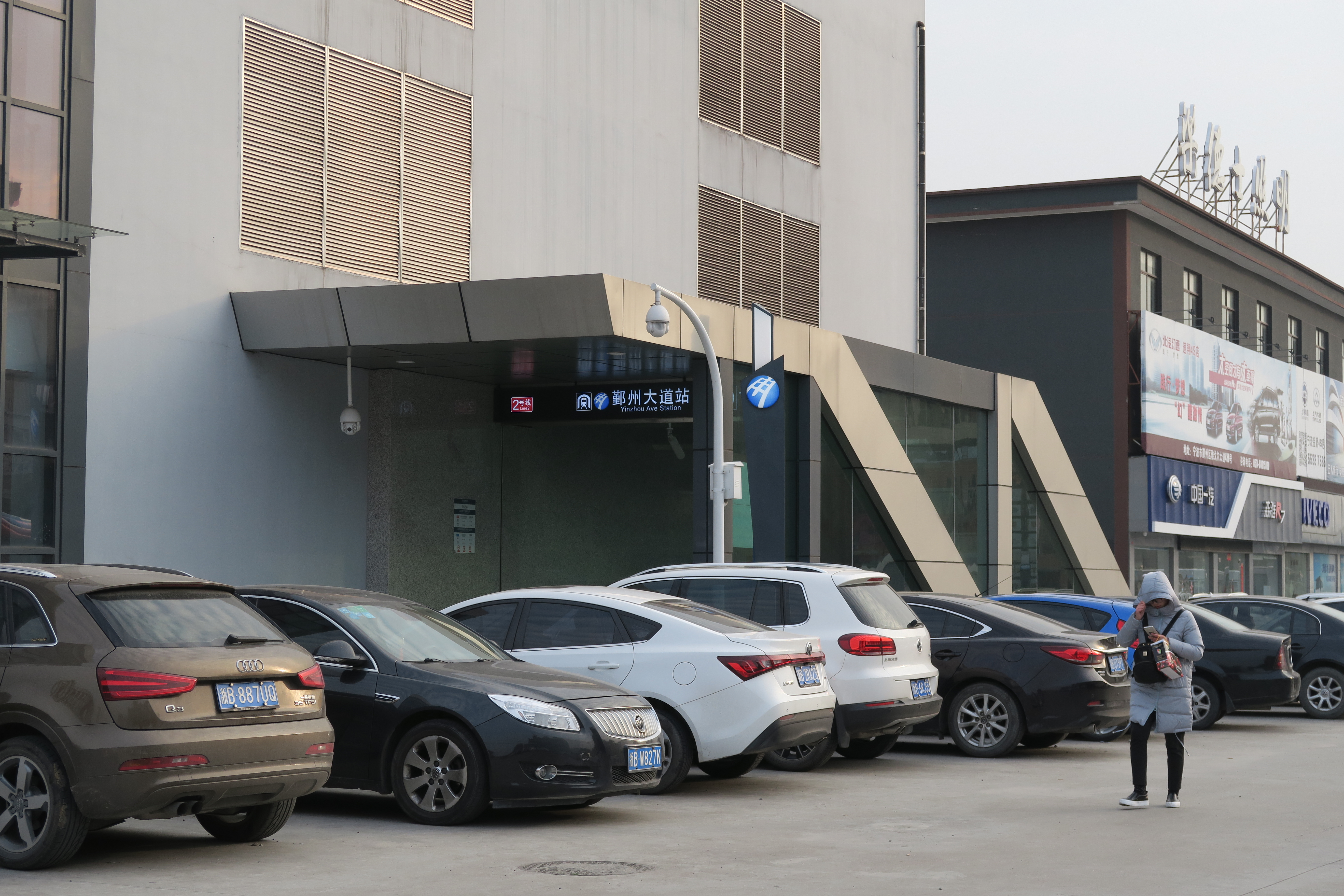 地铁鄞州大道站